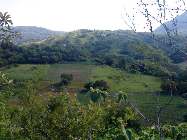 Vegetación en el 42